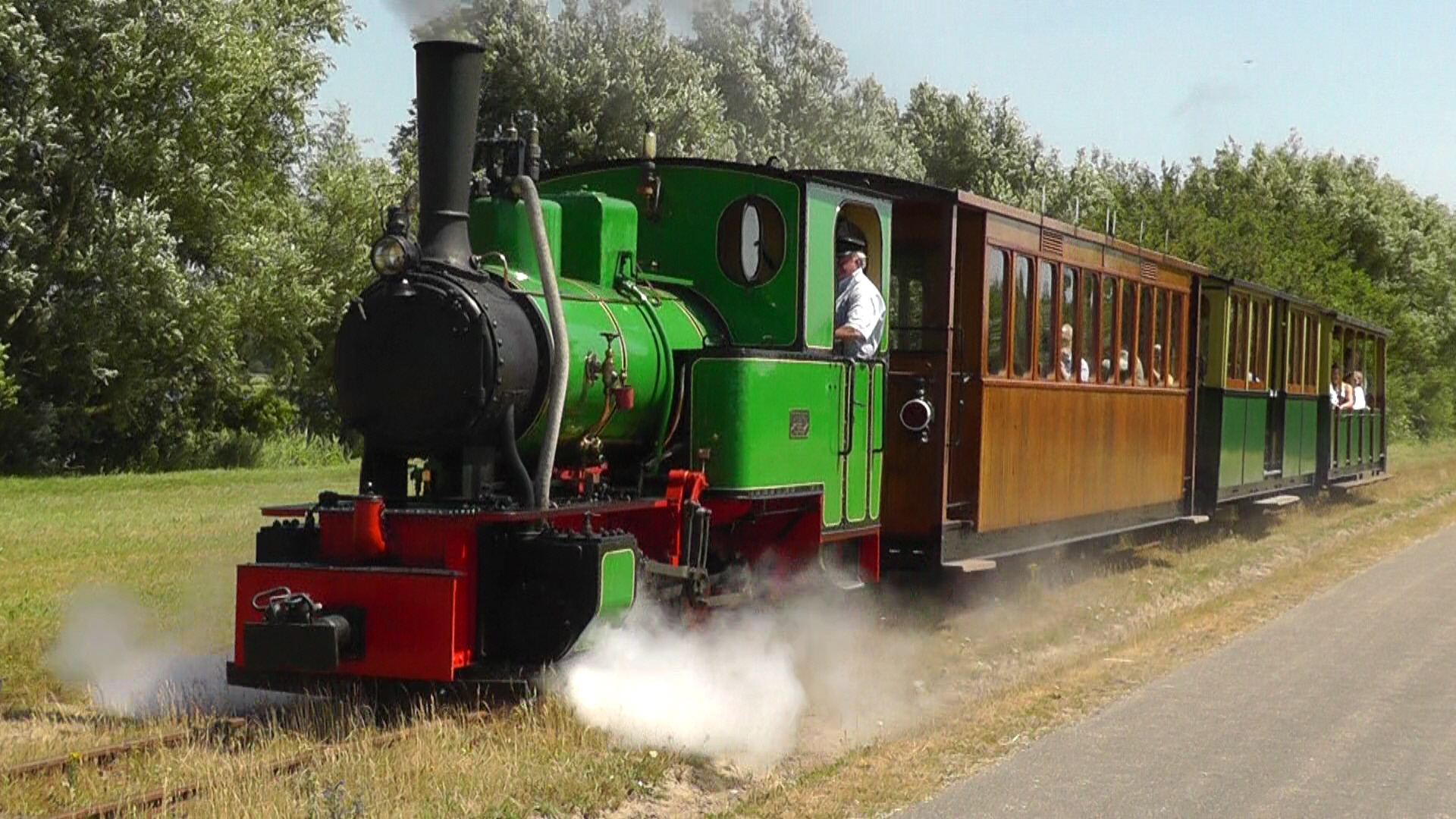 Museumszug der Stoomtrein Valkenburgse Meer